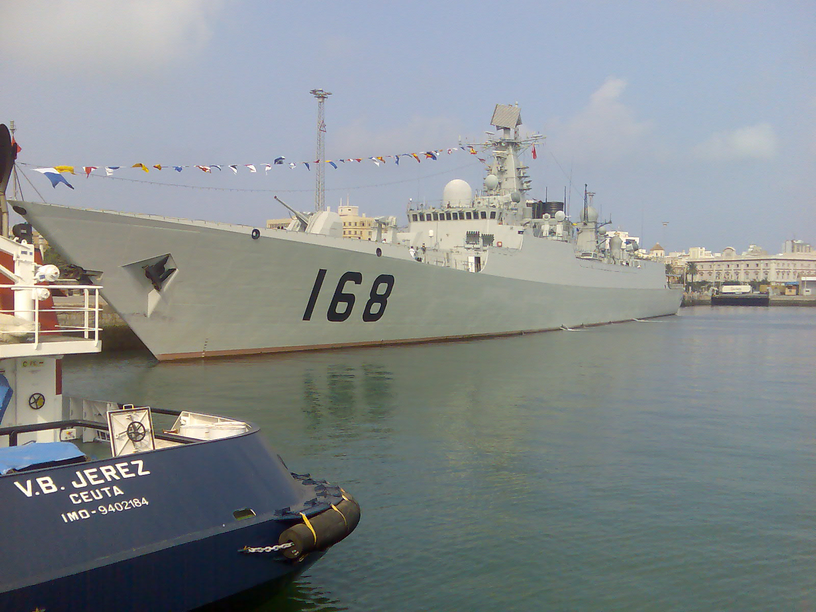 El destructor de la Republica Popular China Guangzhou en el puerto de Cádiz. Fue construido en los astilleros de Shanghai y está en servicio desde 2004